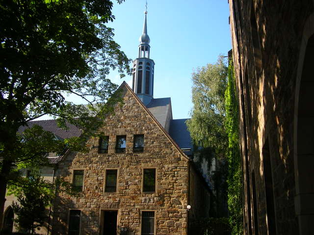 Probsteihof